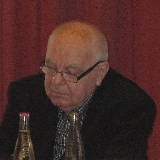 Jiří Brabec, seminář Centra pro ekonomiku a politiku Viktor Dyk – Osmdesát let od smrti